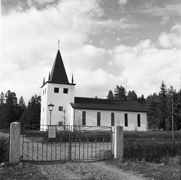 Lagmansereds kyrka